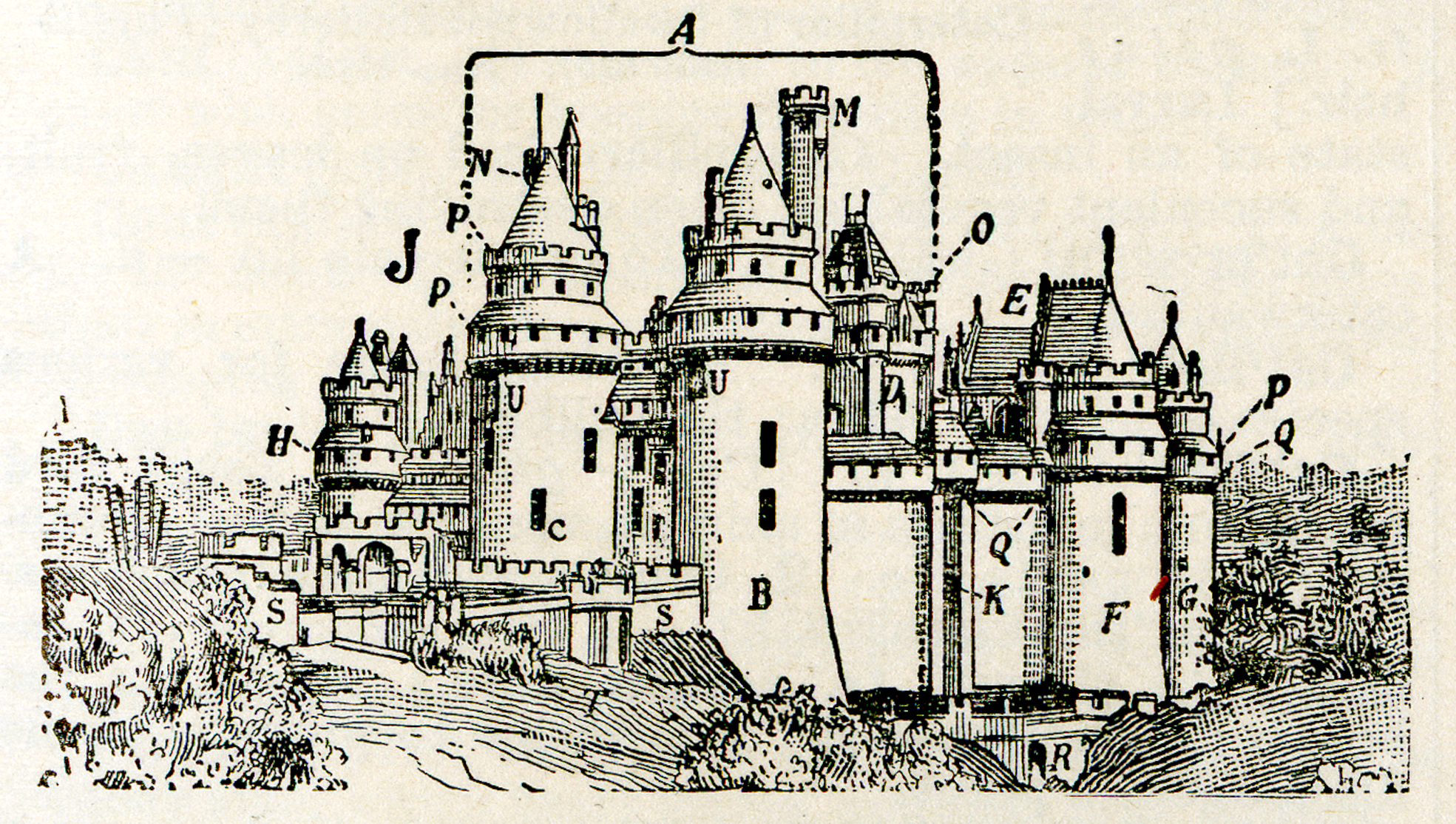 Caricata da Commons dopo aver riquadrato l'immagine originale. Marrabbio2